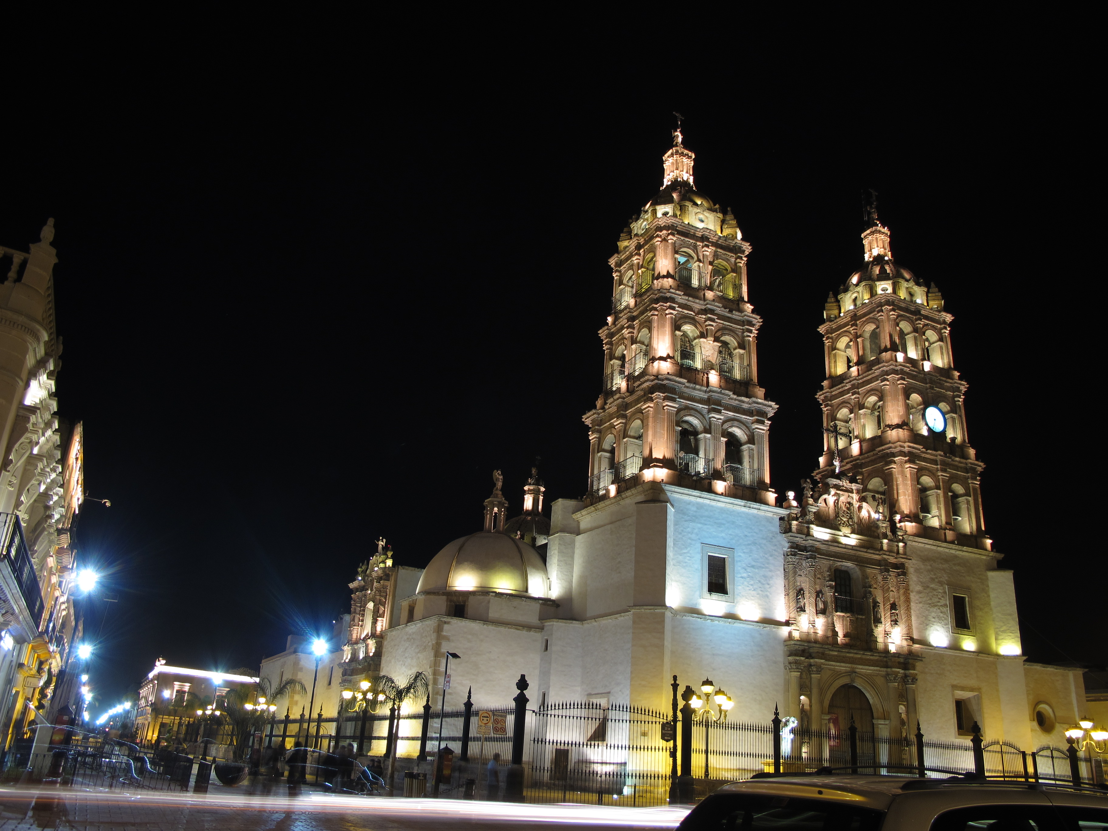 Fotografía nocturna de la Catedral Basílica Menor de la Inmaculda Concepción